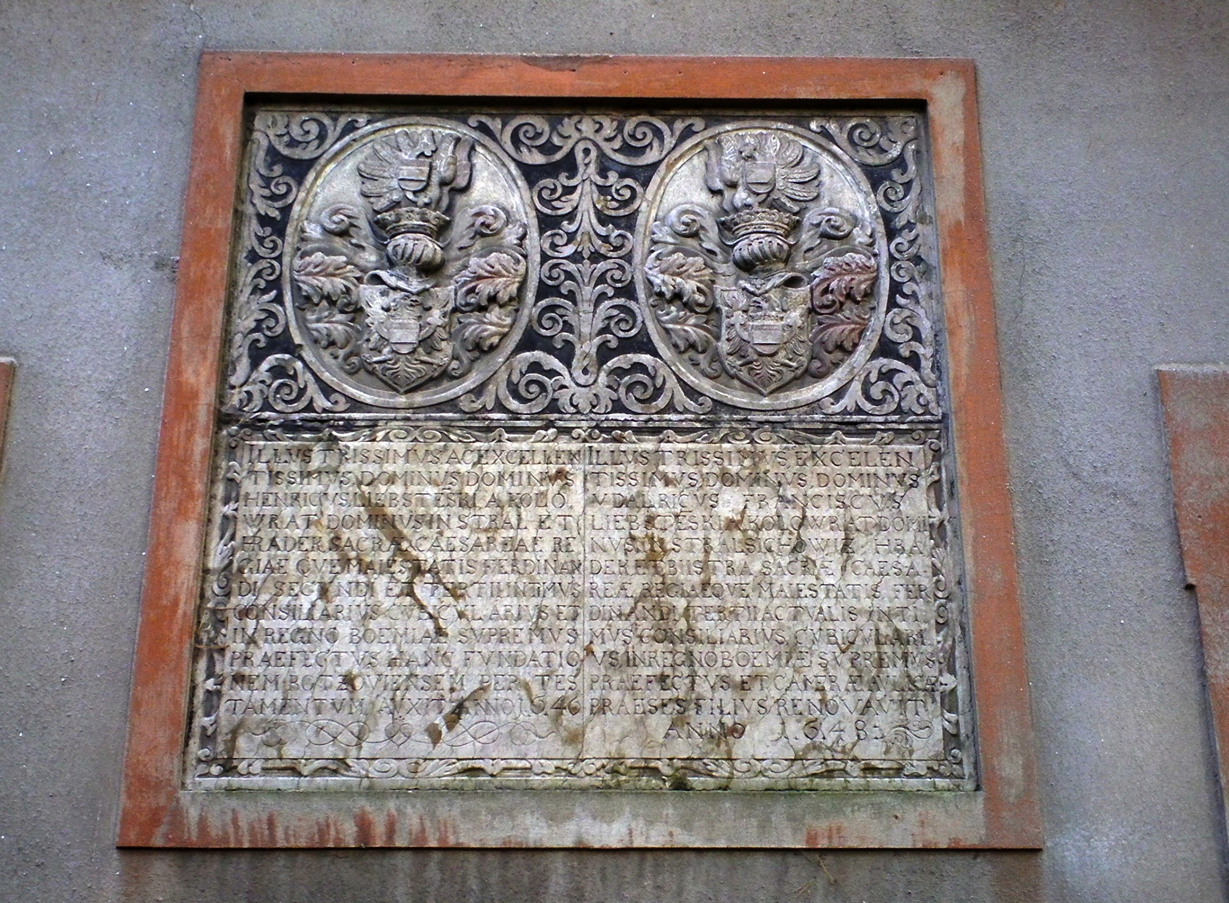 detail - klášter dolní ročov